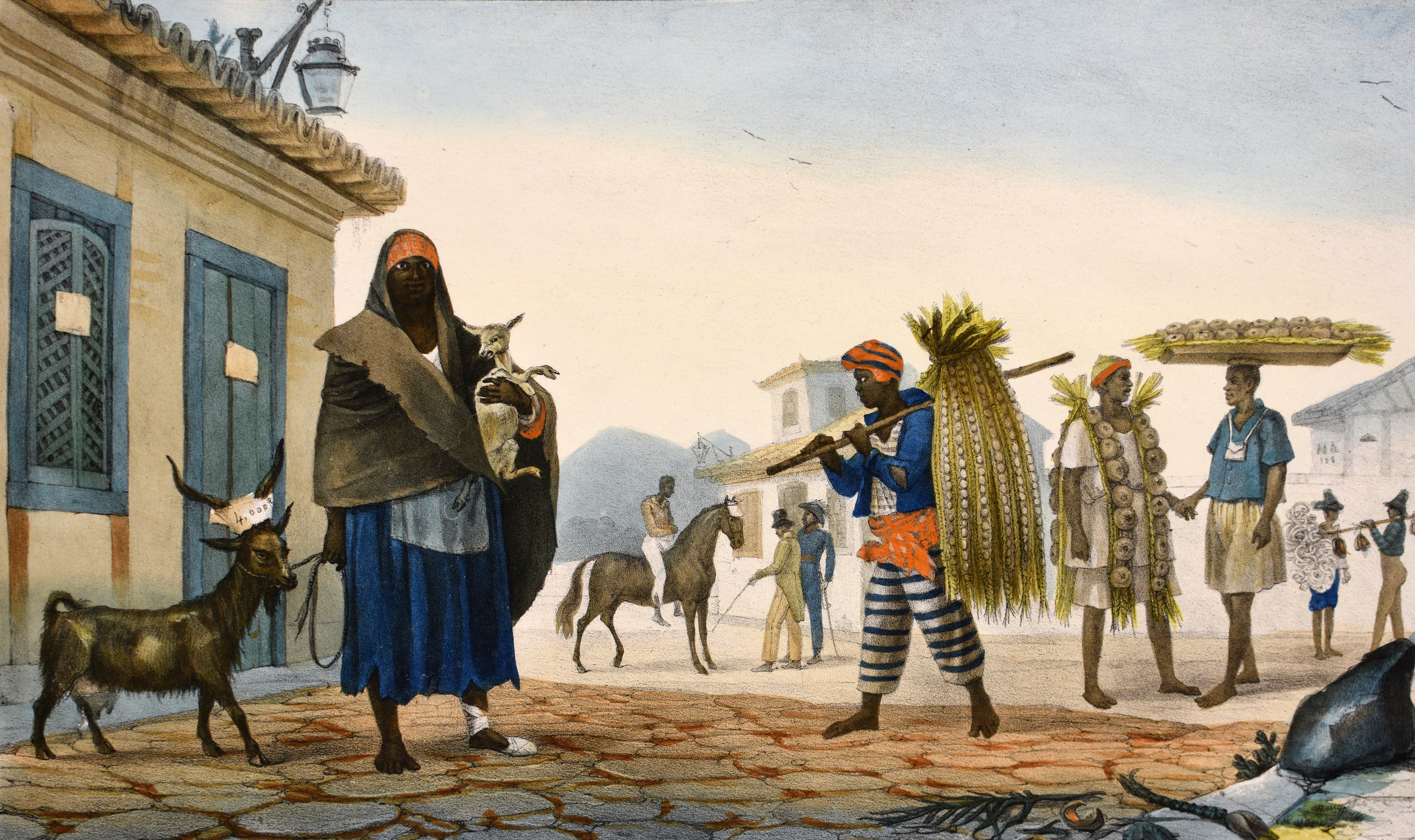 Handcoloured lithographs (from Debret’s Voyage Pittoresque et Historique au Brésil, Paris, 1834-39, 2, pls 30 and 24), printed by Thierry Frères, Paris